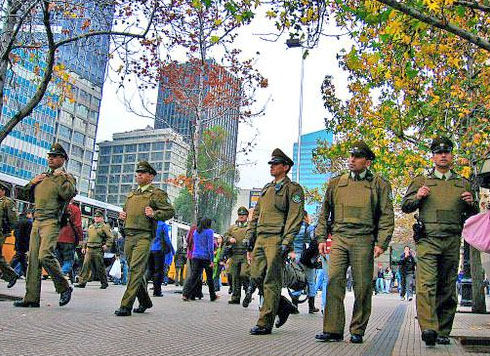 Carabineros de Chile frente a Universidad de Chile, Santiago